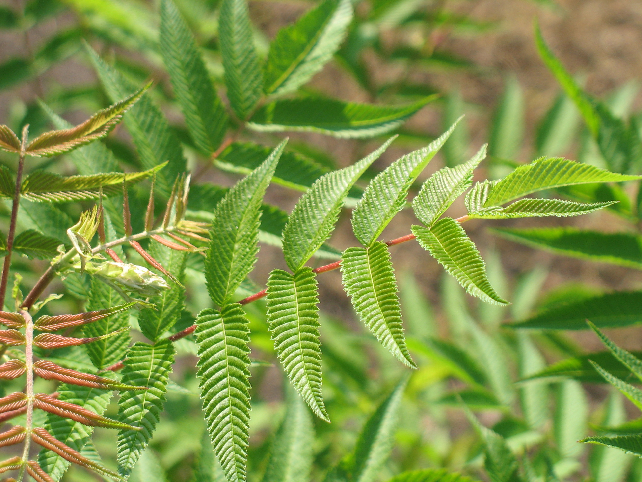 Tawlina jarzębolistna, sorbaria jarzębolistna (Sorbaria sorbifolia). Zdjęcie wykonane 25.06.06 w Miejskim Ogrodzie Botanicznym w Zabrzu